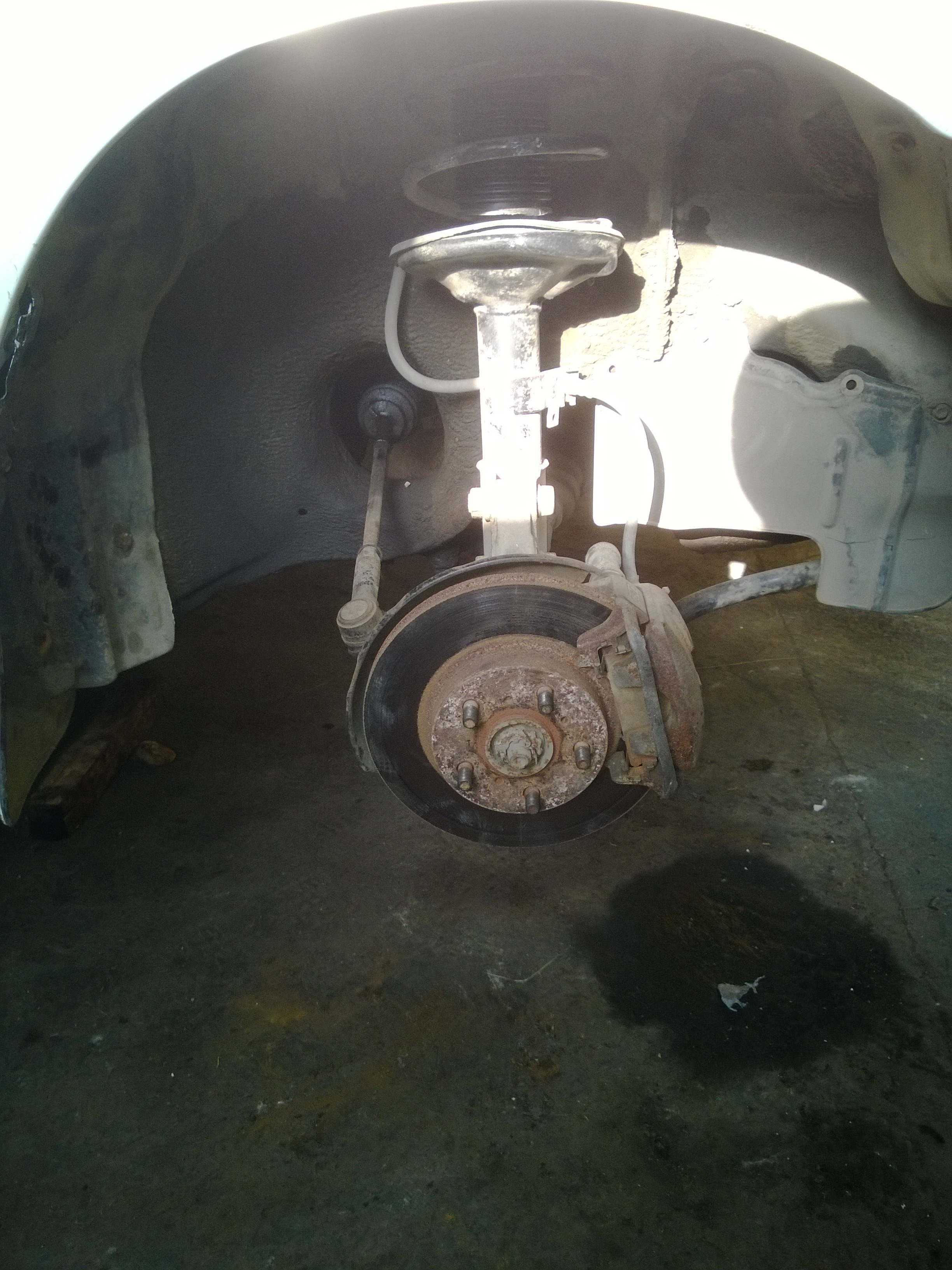 TOYOTA Vista SV21 McPherson